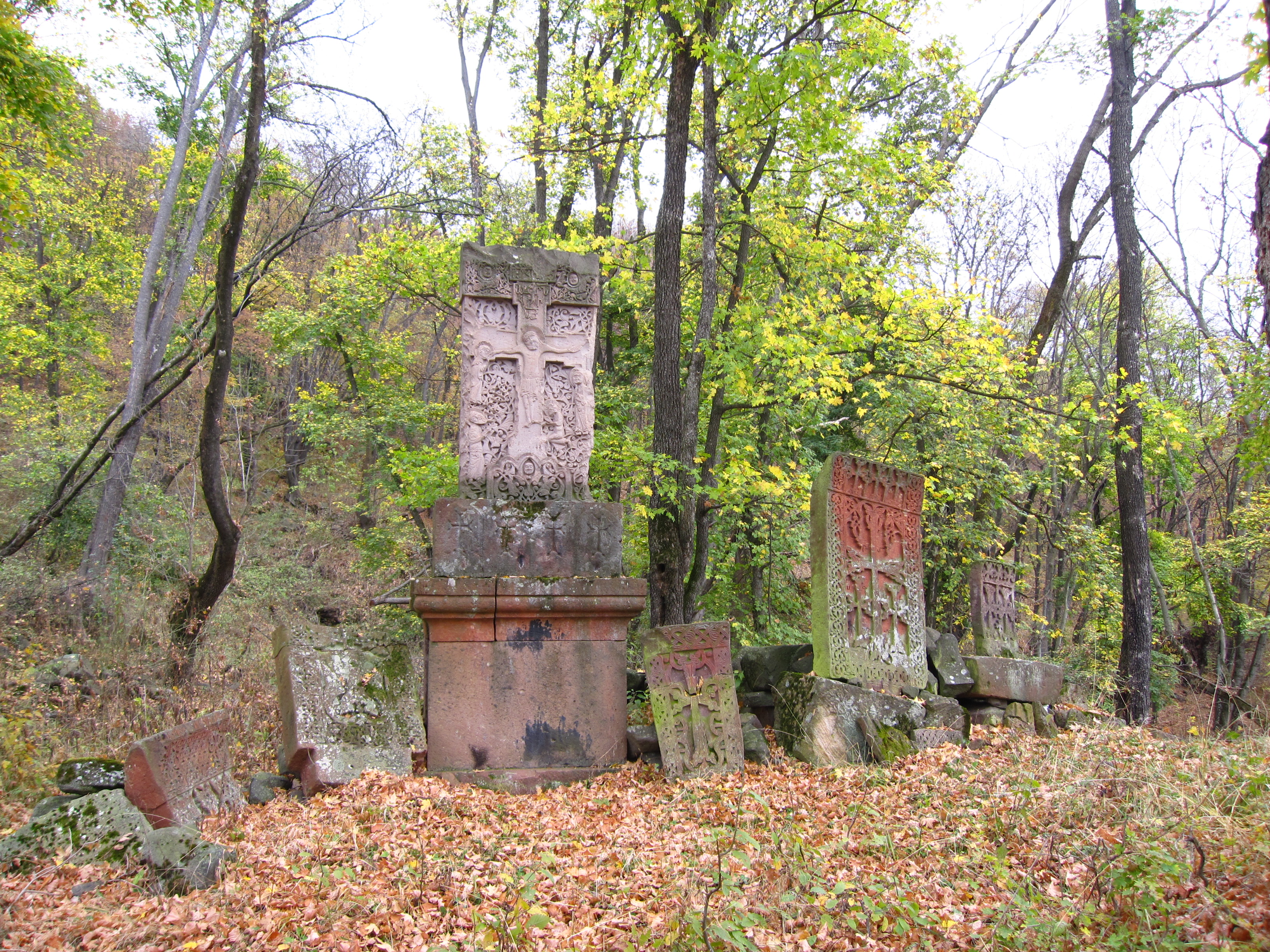 Մարցի Ամենափրկիչ խաչքար (Ճքնըվերի խաչ) 71/19.1.6